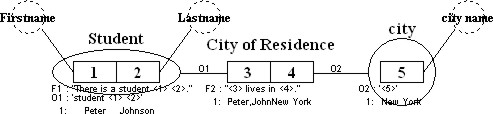 Een grafische afbeelding van een feituitspraak in FCO-IM.